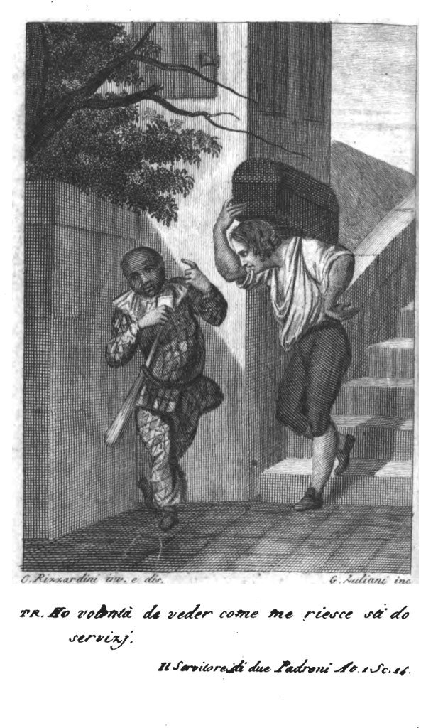 Truffaldino: "Ho volontà de veder come me riesce sti do servizi." English (I'd like to see how I'll manage to serve two [masters].)